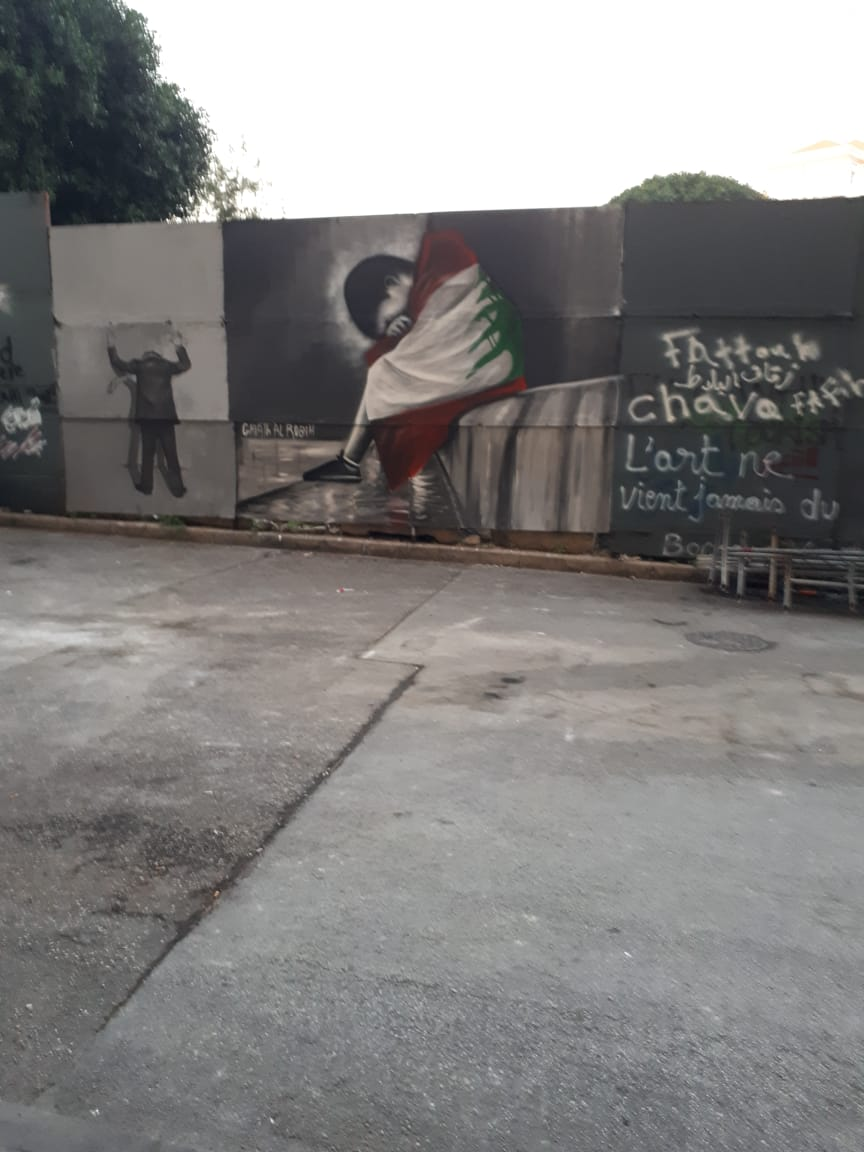 Graffitis in der Innenstadt von Beirut während der Proteste im Libanon